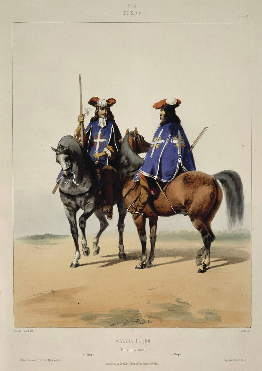 Maison du Roi, mousquetaires, Louis XIV, 1663. Planche originale extraite de l'ouvrage Costumes militaires français depuis l’organisation des premières troupes régulières en 1439 jusqu’en 1789, par Alfred de Marbot et Joseph-Édouard Dunoyer de Noirmont, Paris, Clément, s.d. (1830-1860).